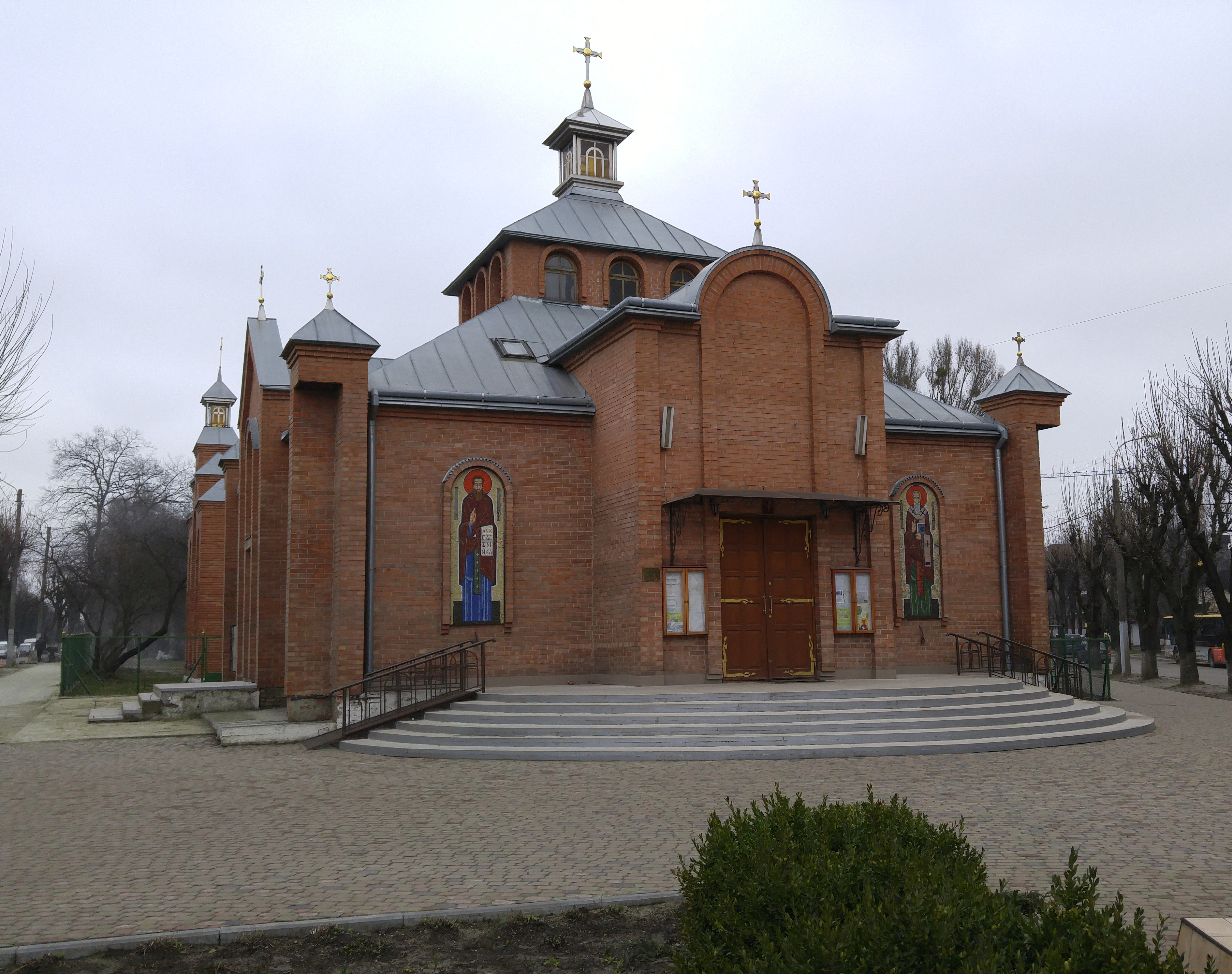 Будівля храму святих Кирила та Мефодія, УГКЦ. 2000 року закладено будівництво. Україна, Львів, вул.Угорська,1.